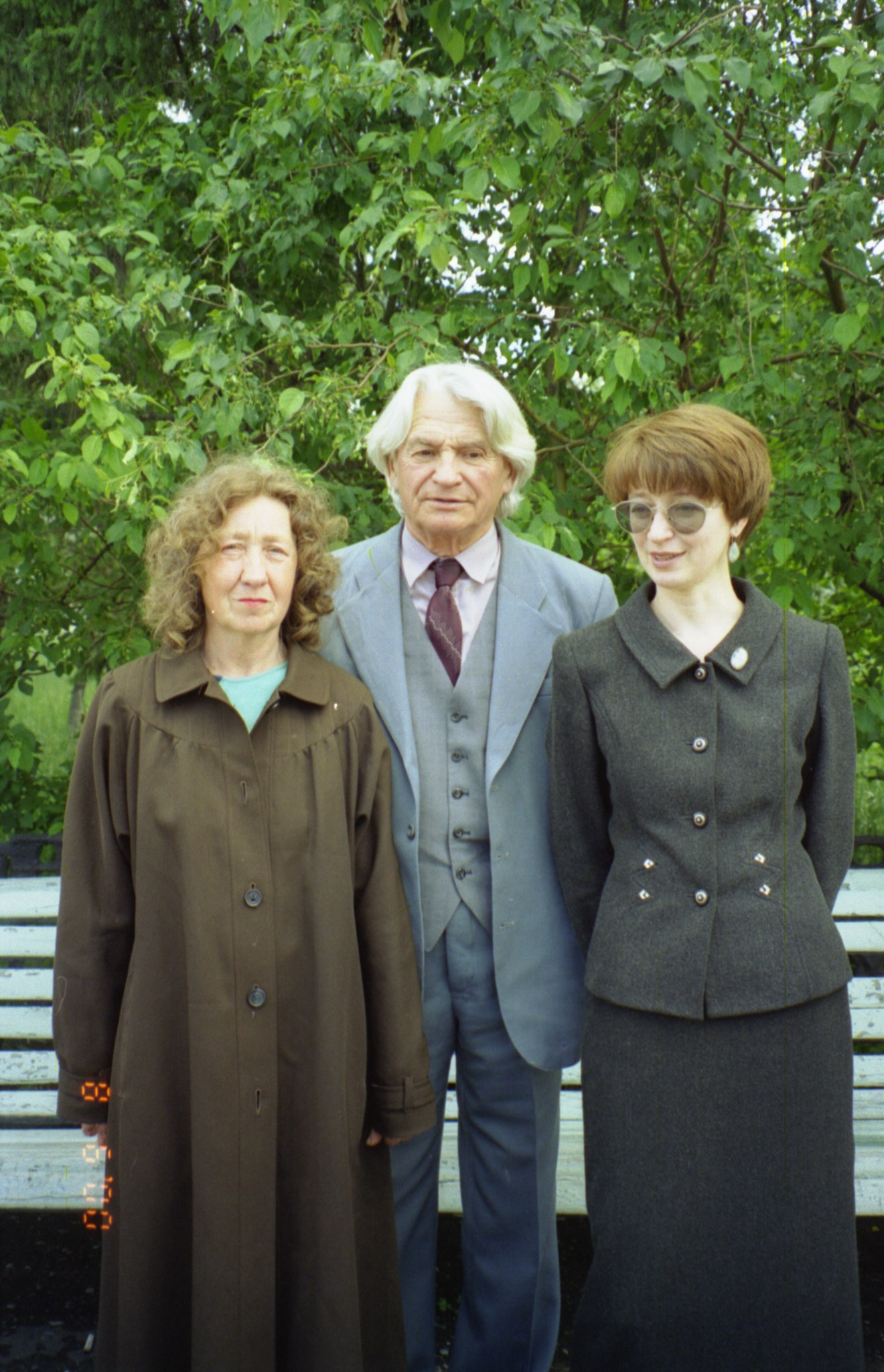 Матющенко Владимир Иванович с женой и дочерью